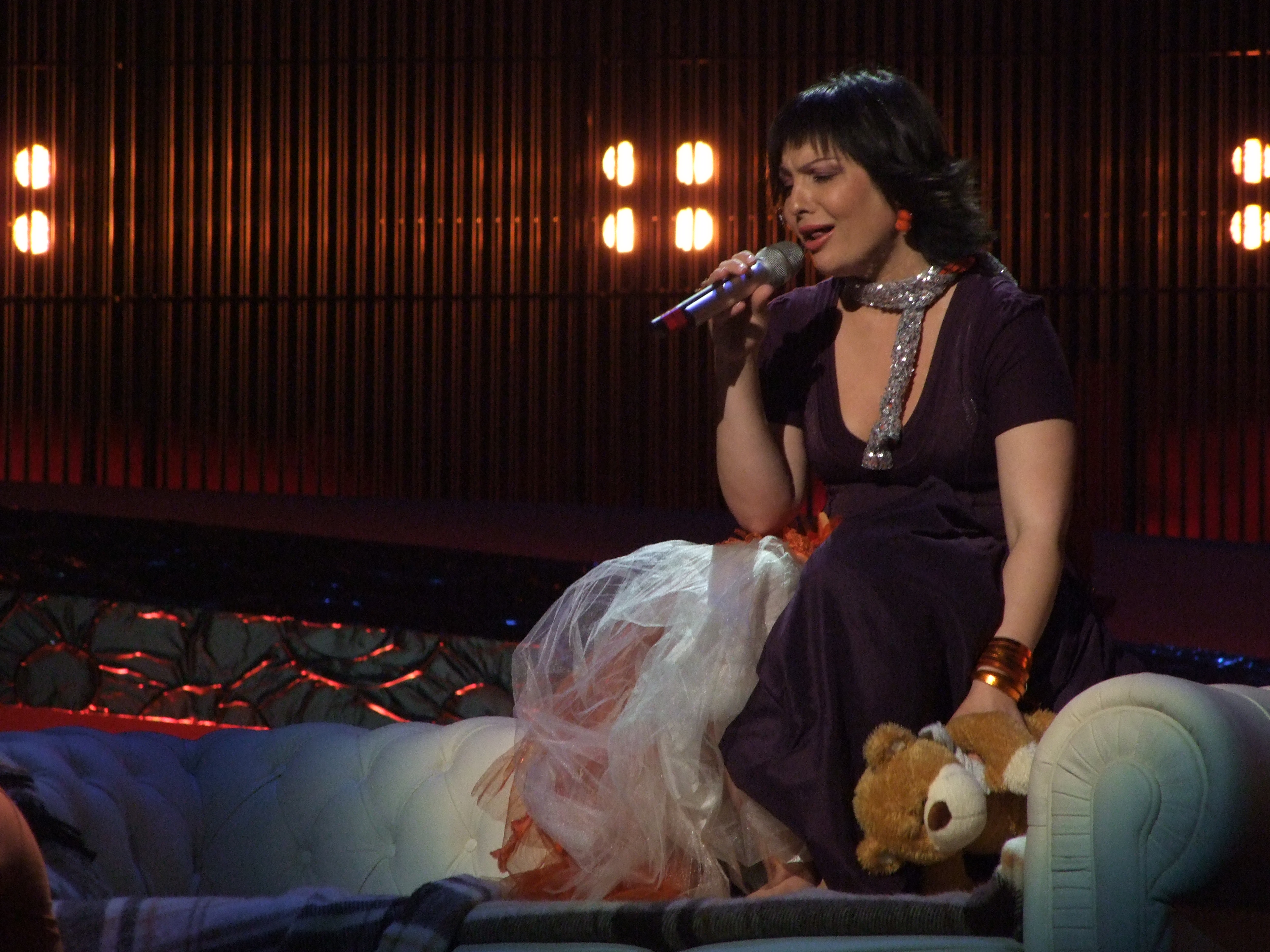 Semifinal 1 EUROVISION 2008